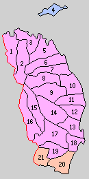 大分県東国東郡の町村制時点の町村。